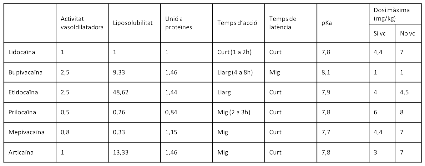 Amb aquest resum es posen de manifest les diferències entre els diferents fàrmacs utilitzats actualment.